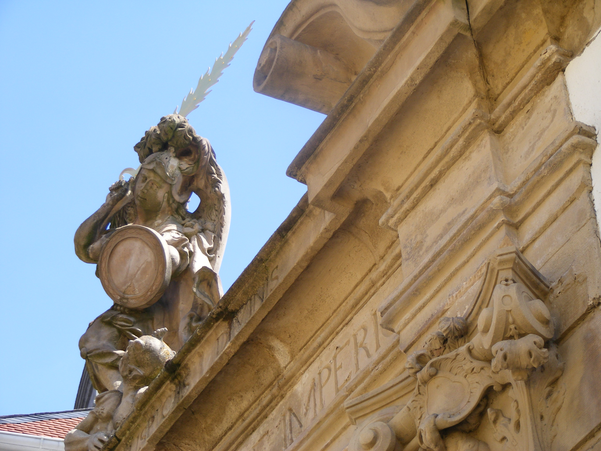 Michelstor des Sturmfedersches Schlosses in Dirmstein, Marsilius Franz Sturmfeder von Oppenweiler als St. Michael mit dem Flammenschwert